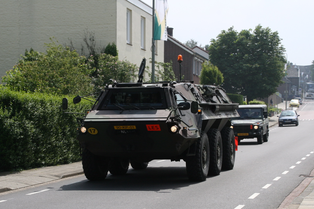 TPz Fuchs 1